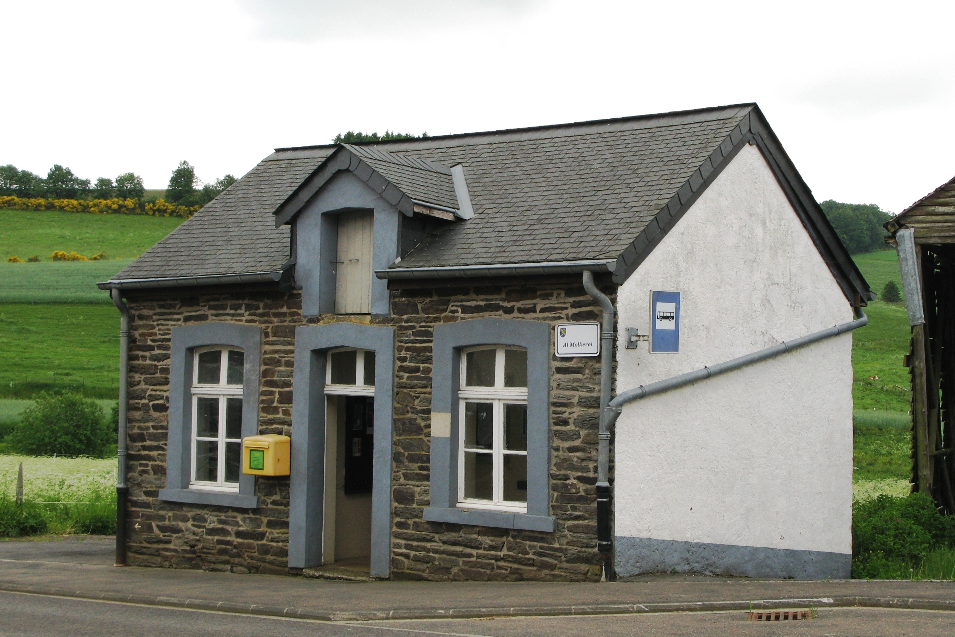 Déi al Molkerei zu Breedelt Quell:eege Foto Les Meloures